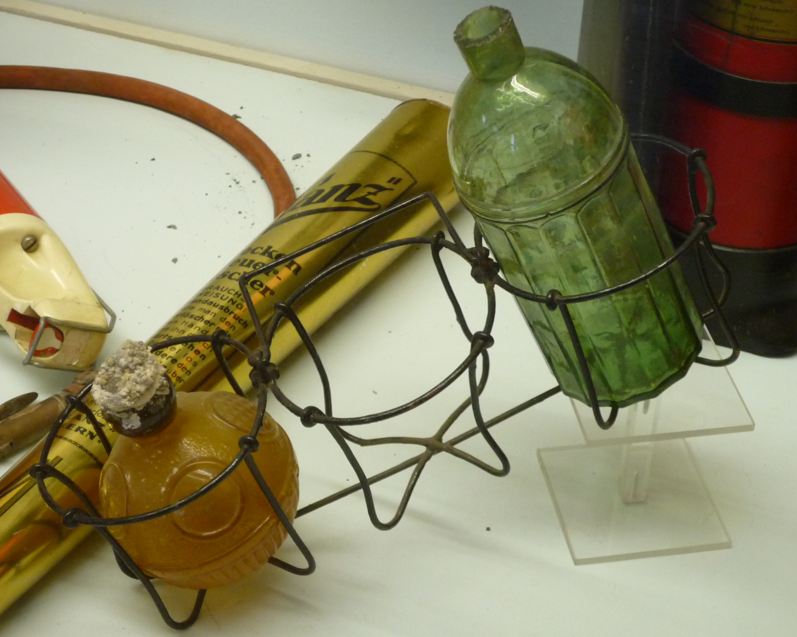 Gläserne Löschbombe aus der Zeit um 1700 im Feuerwehrmuseum in Salem am Bodensee. Gezündet wurde die Mischung aus feinem Alaunpulver und einem Schuss Schießpulver durch den Schwefelfaden, der aus der Öffnung heraushängt.